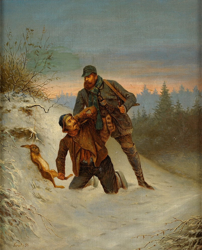 Fallensteller. Signiert. Öl auf Leinwand/Holz, 40 x 32 cm